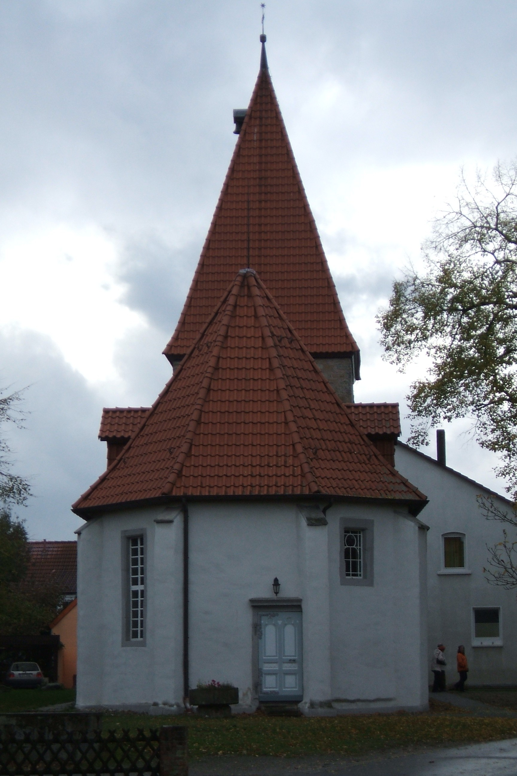 Pattensen, Niedersachsen, Deutschland, die Kirche im Ortsteil Hüpede